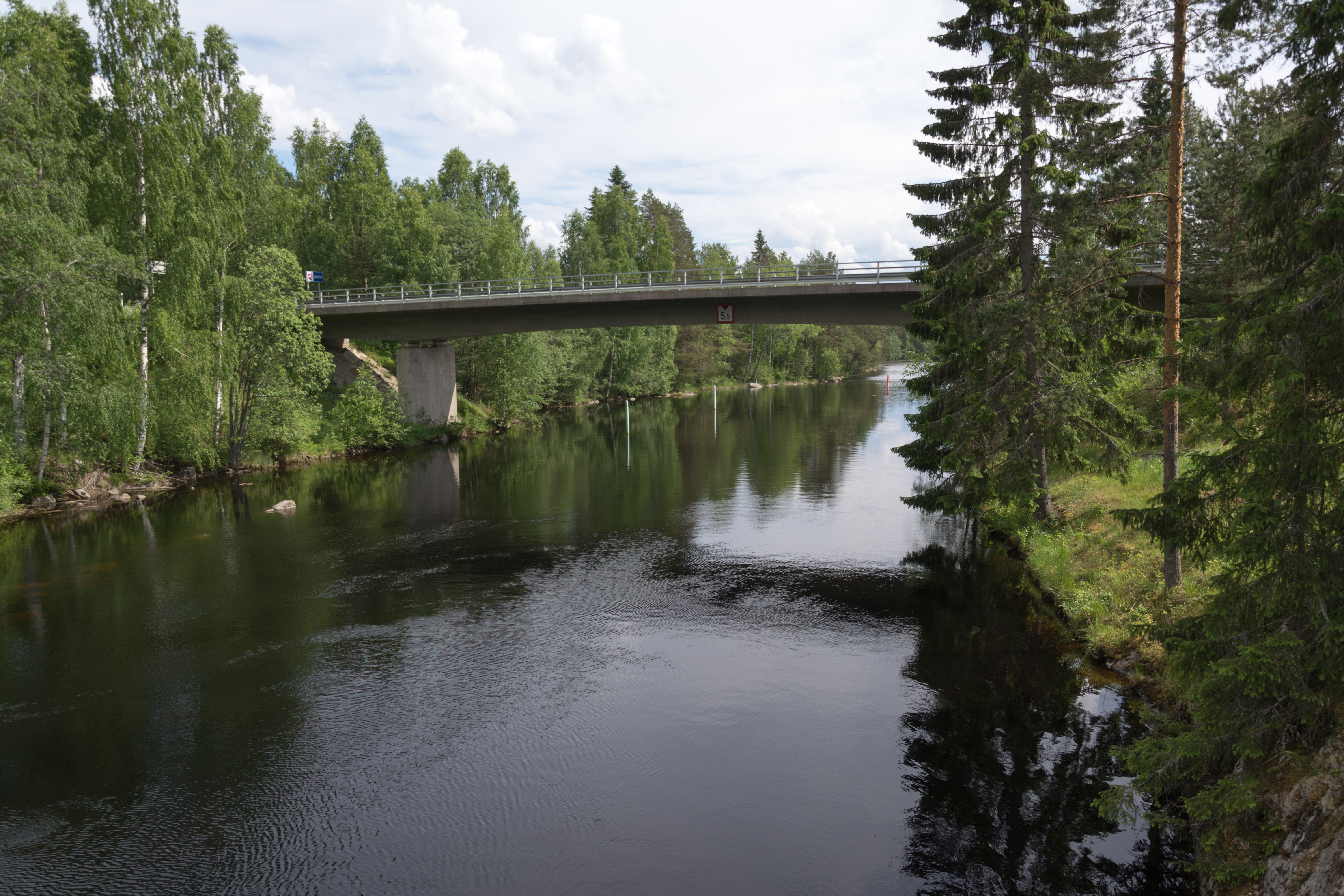 Kaavinkosken kanava Kaavin ja Tuusniemen rajalla